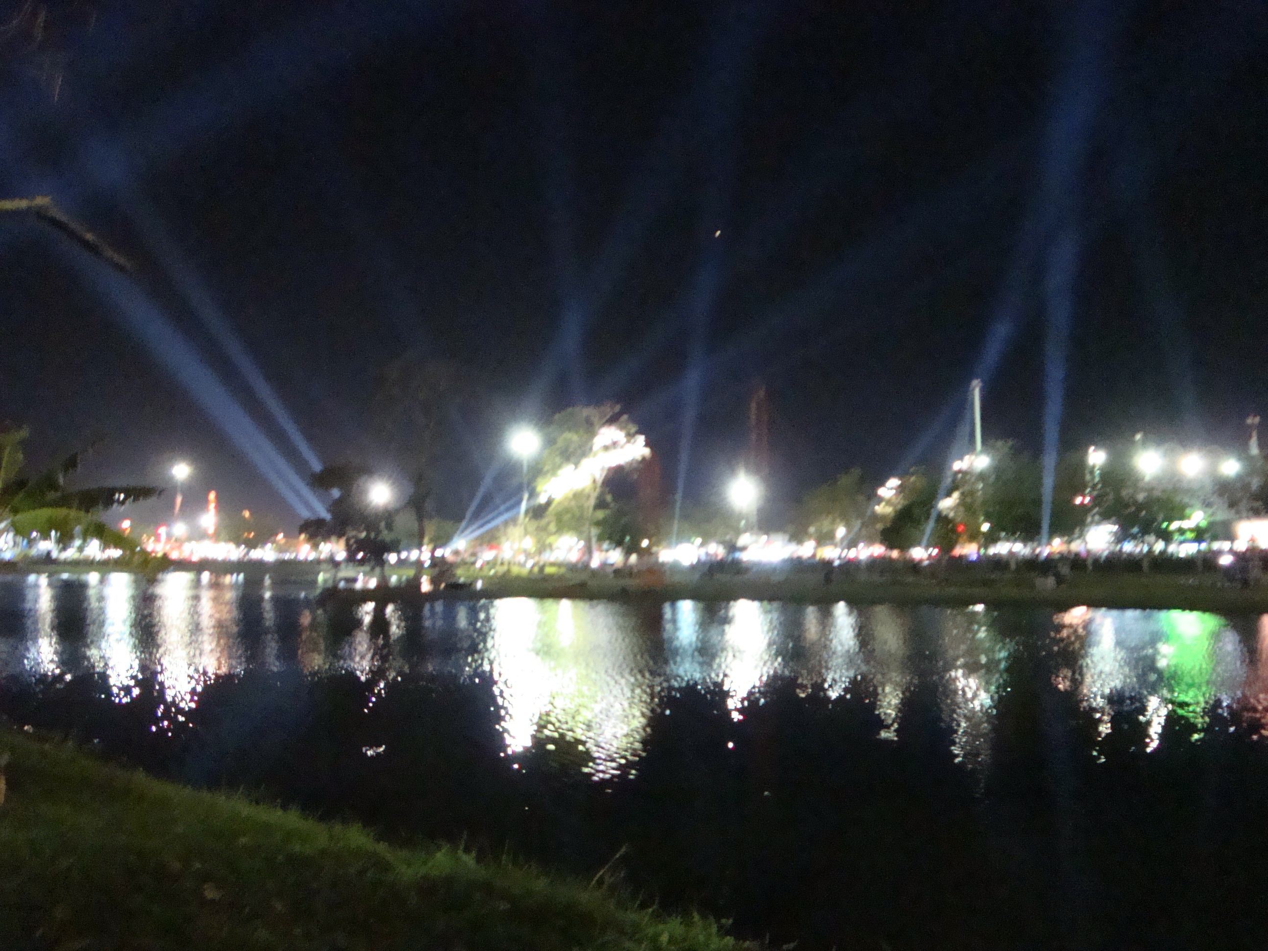 Panorámica nocturna del Parque Tabasco, dede el malecón de la laguna interior.